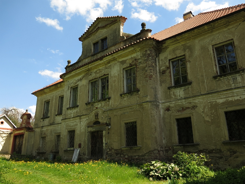 Zámek Bolechovice, Bolechovice 1, 24, Bolechovice.